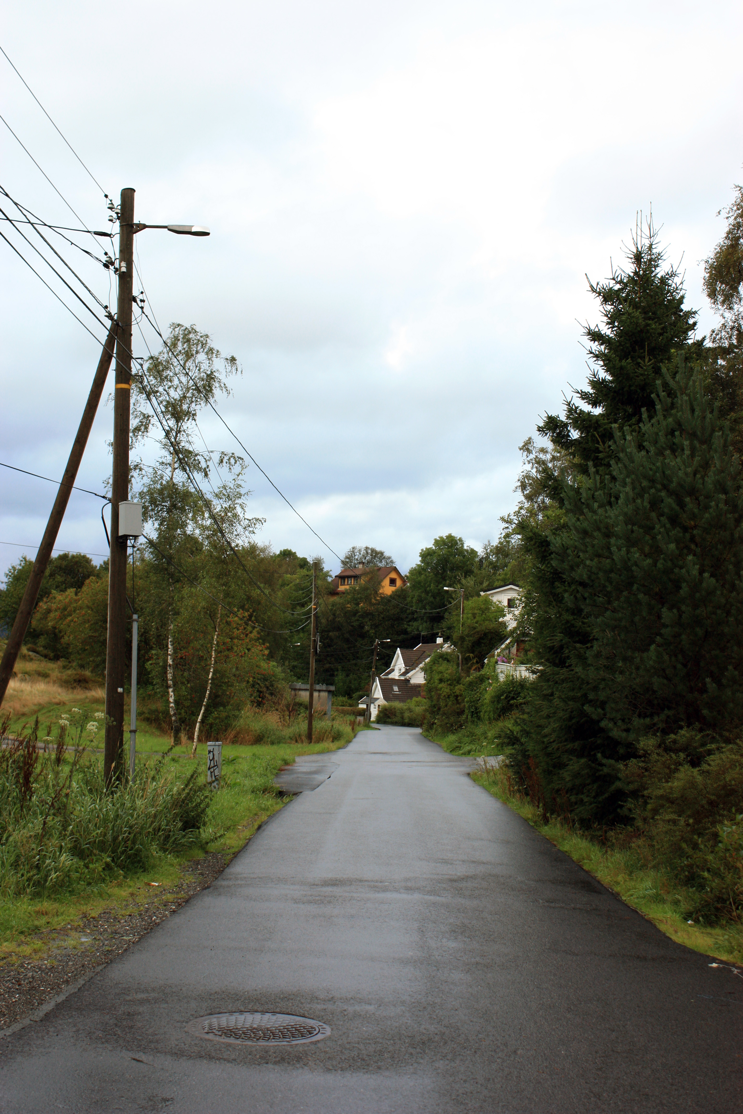 Skjoldstølen, Fana, Bergen.